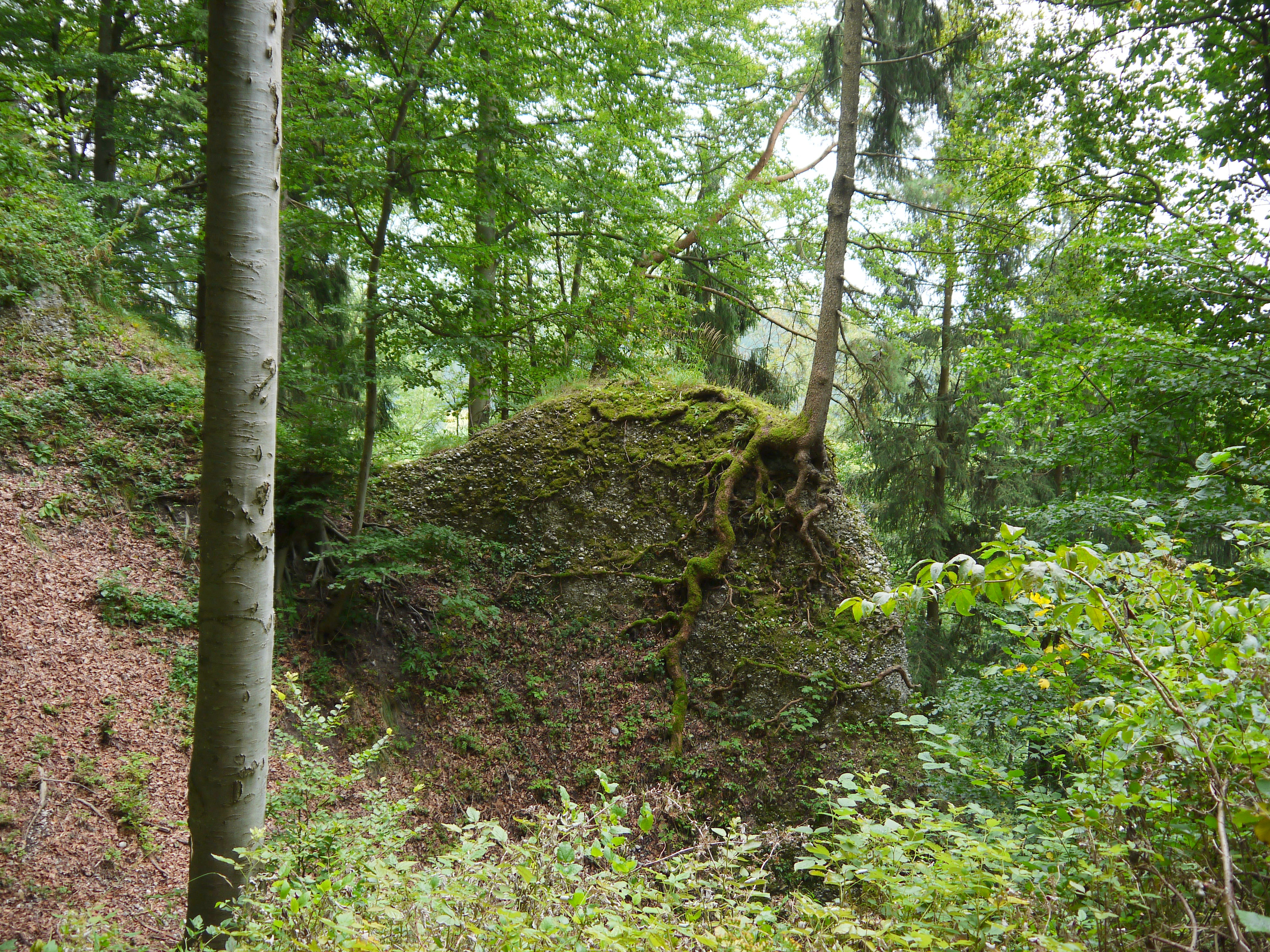 Mittelalterlicher Burgstall Hofberg Ich konnte 4 derartige Steinansammlungen finden